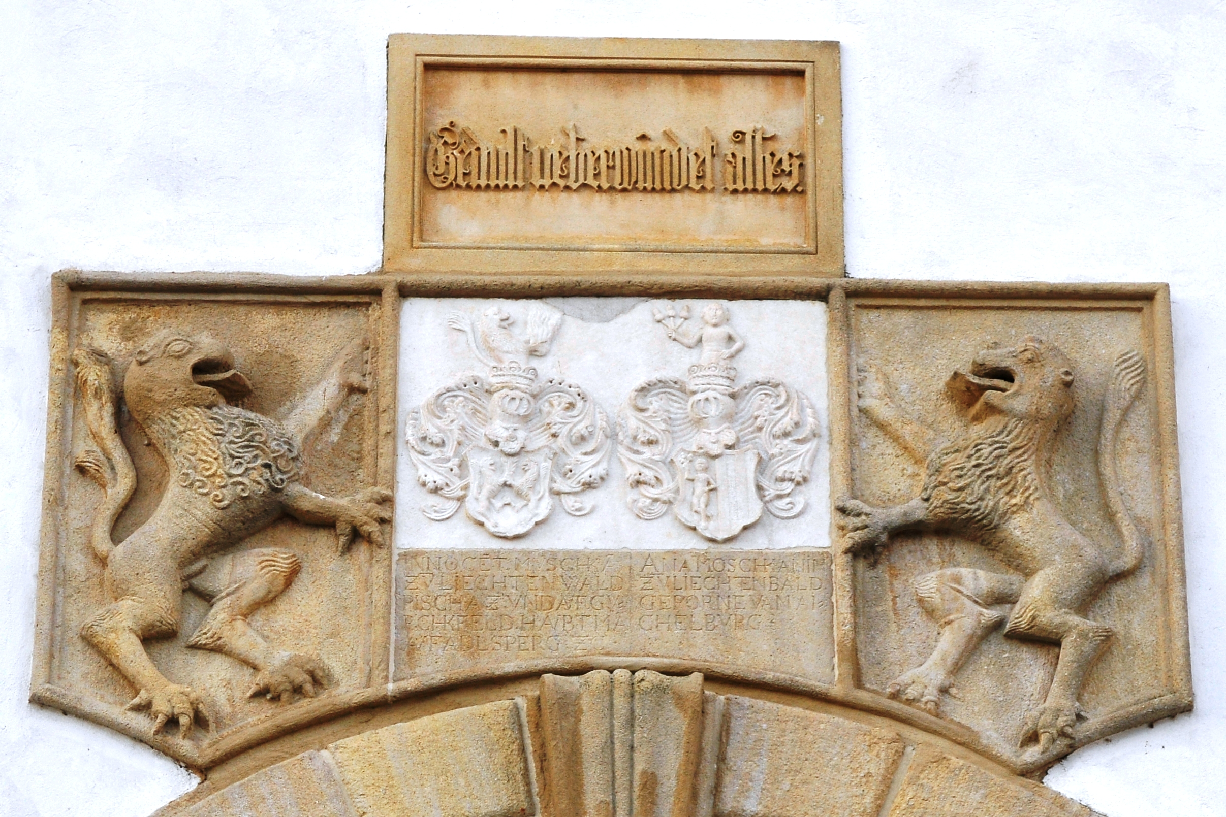 Grba Mosconov in Aichelburgov